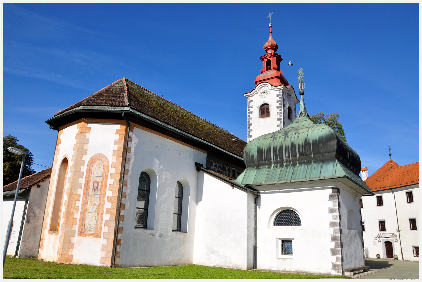 Smarje Sap (1)